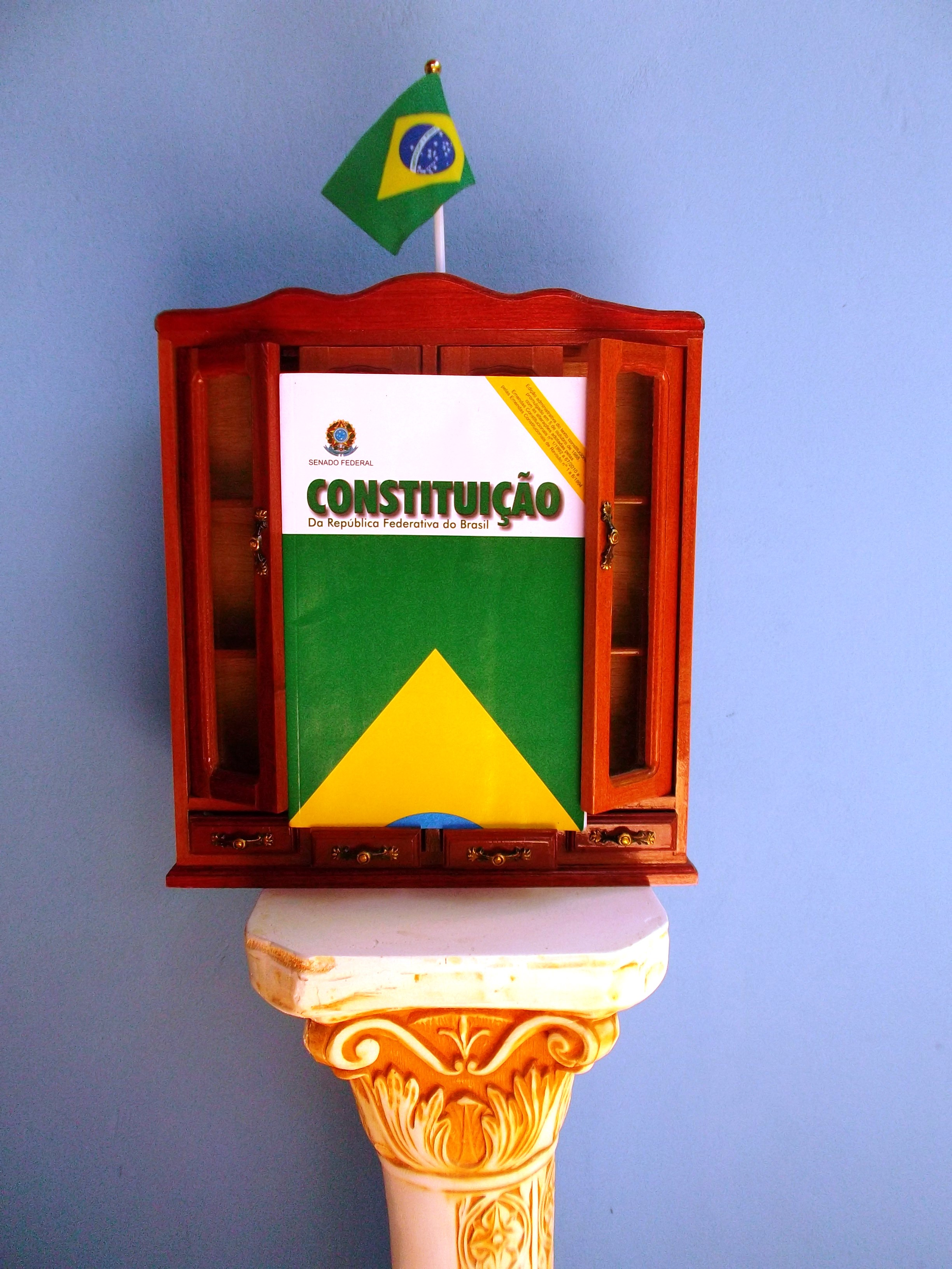 Ornamento cívico com bandeirinha e Constituição do Brasil.